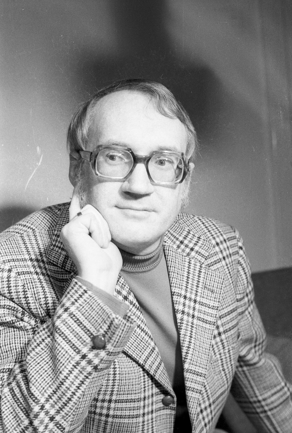 erhält von der Ratsversammlung den Kulturpreis 1974.